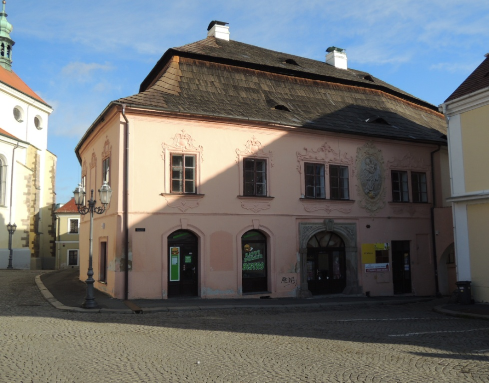 Masarykovo náměstí 88/25, Rokycany